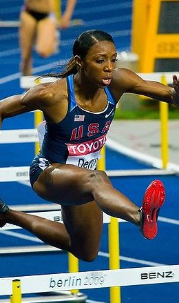 Lashinda Demus Berlin 2009